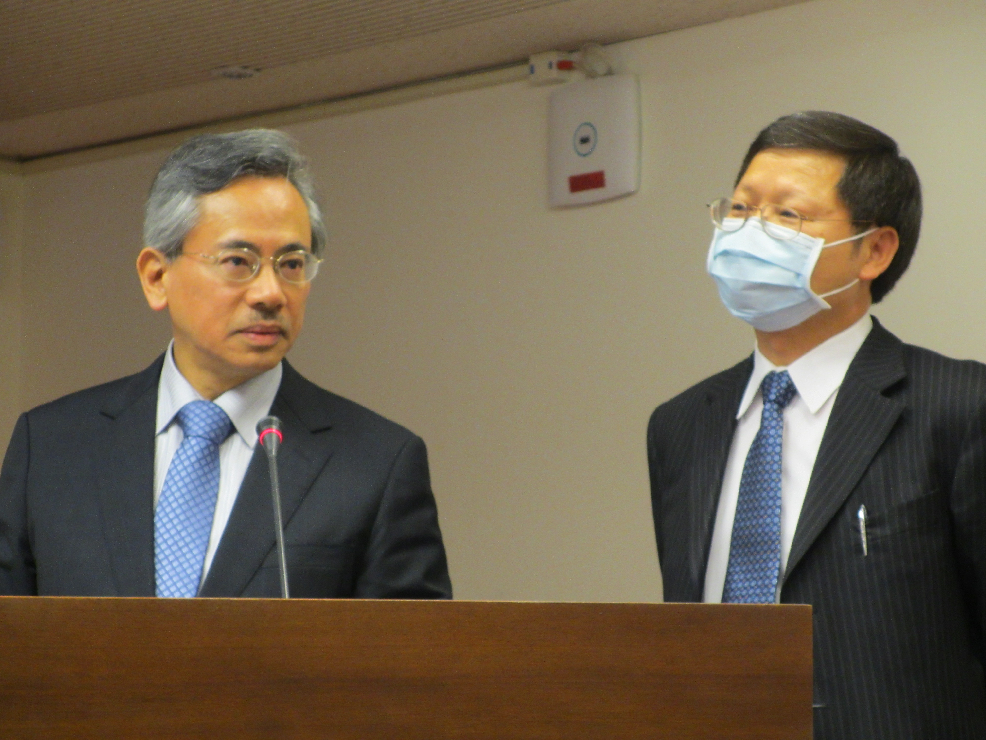 行政院衛生署官員在立法院接受質詢。